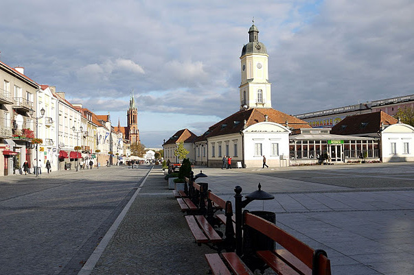 Białystok